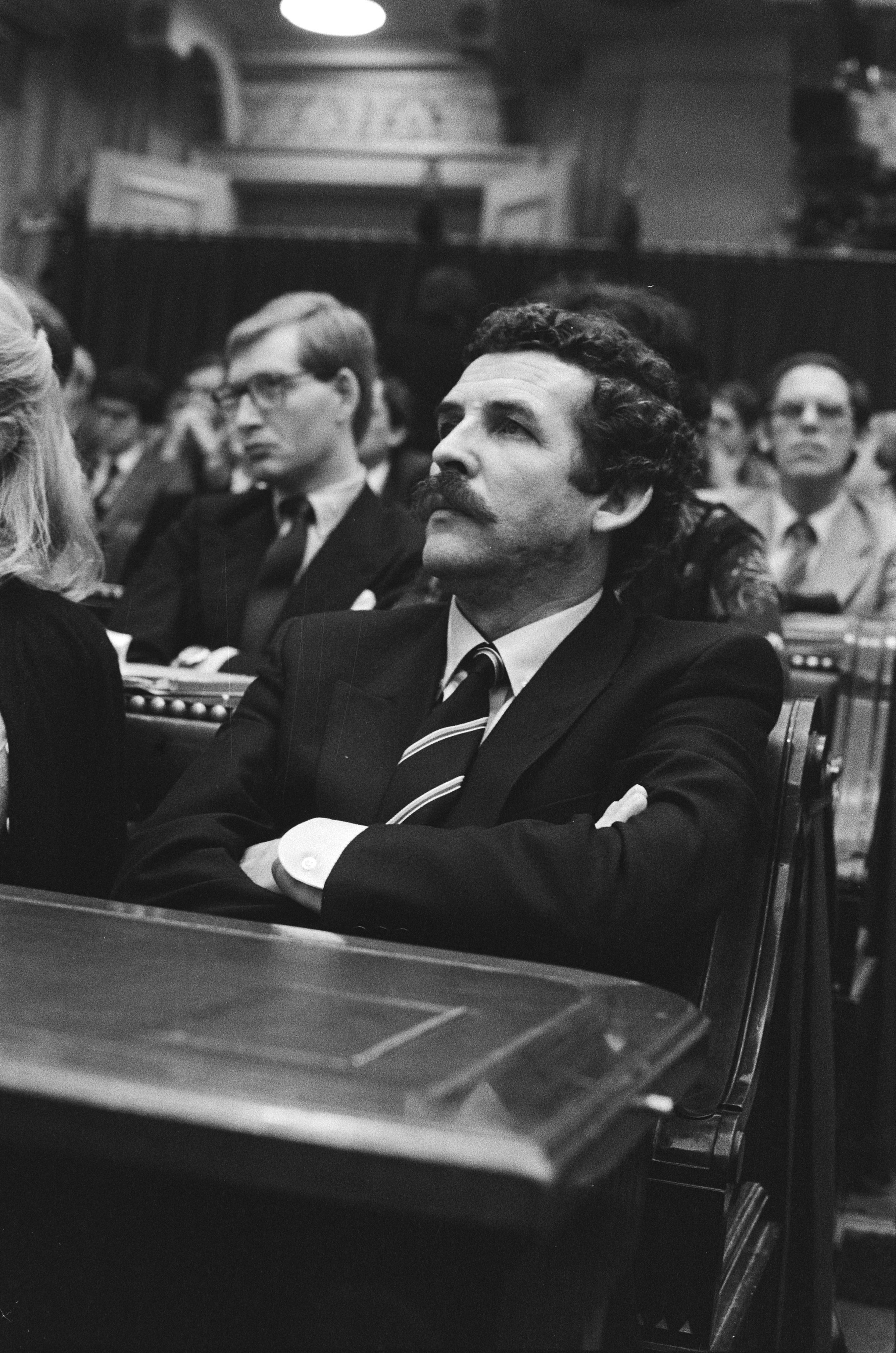 Collectie / Archief : Fotocollectie Anefo Reportage / Serie : Regeringsverklaring van het kabinet Lubbers Beschrijving : Jaap Metz (VVD) in de Tweede Kamer na zijn beëdiging Datum : 22 november 1982 Locatie : Den Haag, Zuid-Holland Trefwoorden : ambtsaanvaardingen, parlementariërs, politiek, regeringen, regeringsverklaringen Persoonsnaam : Metz, Jaap Instellingsnaam : VVD Fotograaf : Bogaerts, Rob / Anefo Auteursrechthebbende : Nationaal Archief Materiaalsoort : Negatief (zwart/wit) Nummer archiefinventaris : bekijk toegang 2.24.01.05 Bestanddeelnummer : 932-4114